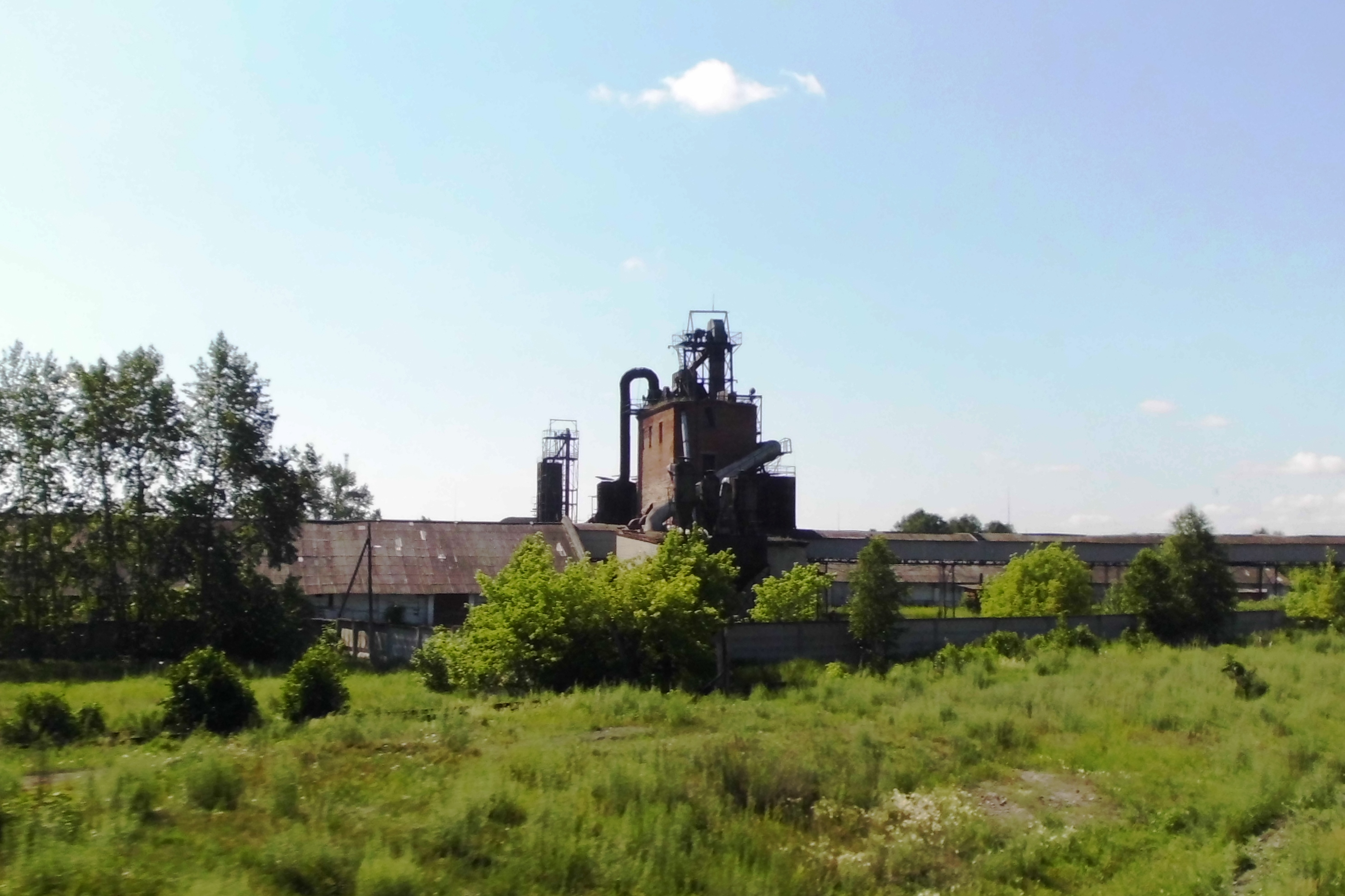 Развалины бывшего хлебоприёмного пункта в посёлке Муслюмово Челябинской области.